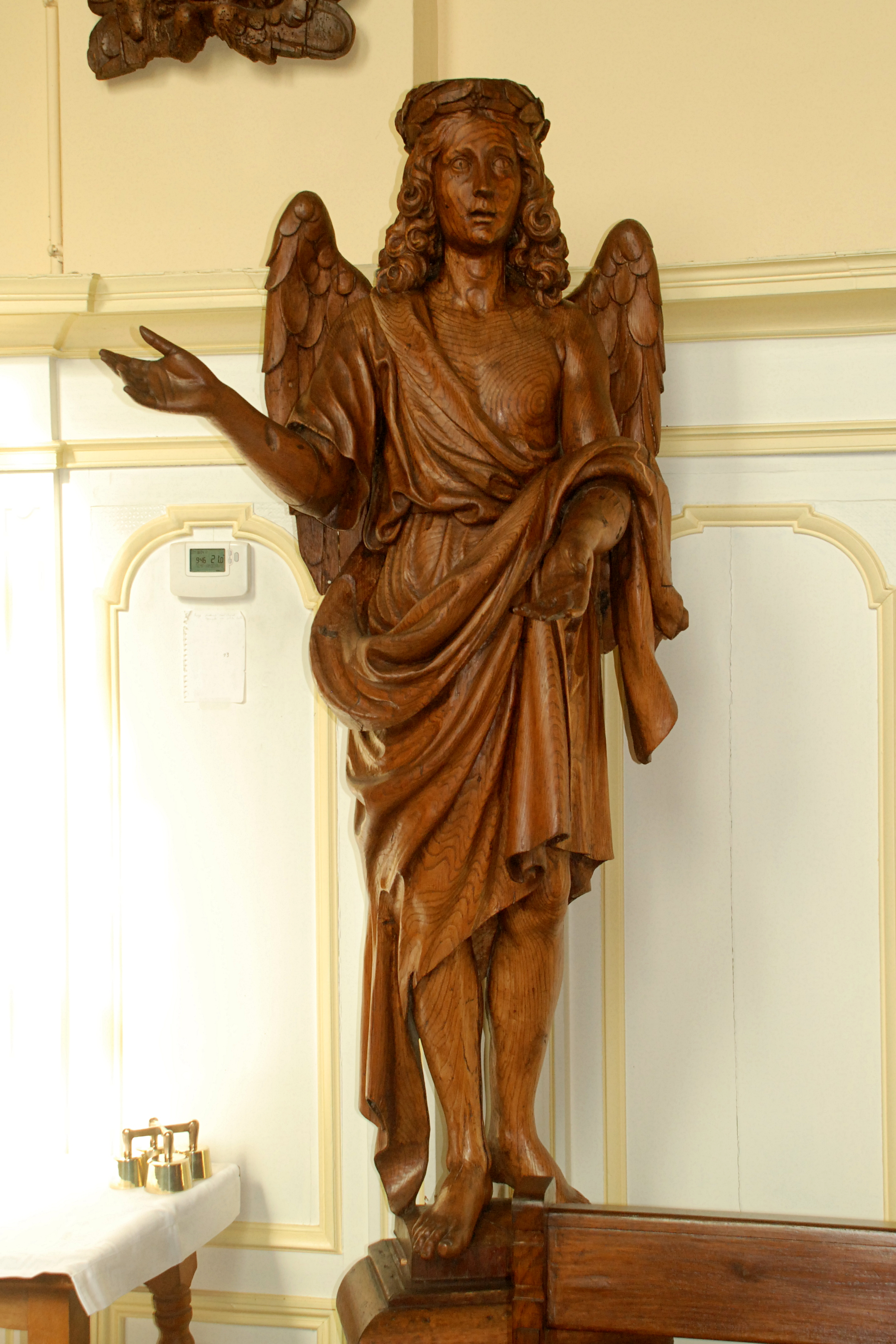 Belgique - Brabant wallon - Mont-Saint-Guibert - Église Saint-Guibert - statuaire baroque provenant de l'ancienne église des Augustins de Bruxelles (désacralisée en 1842)